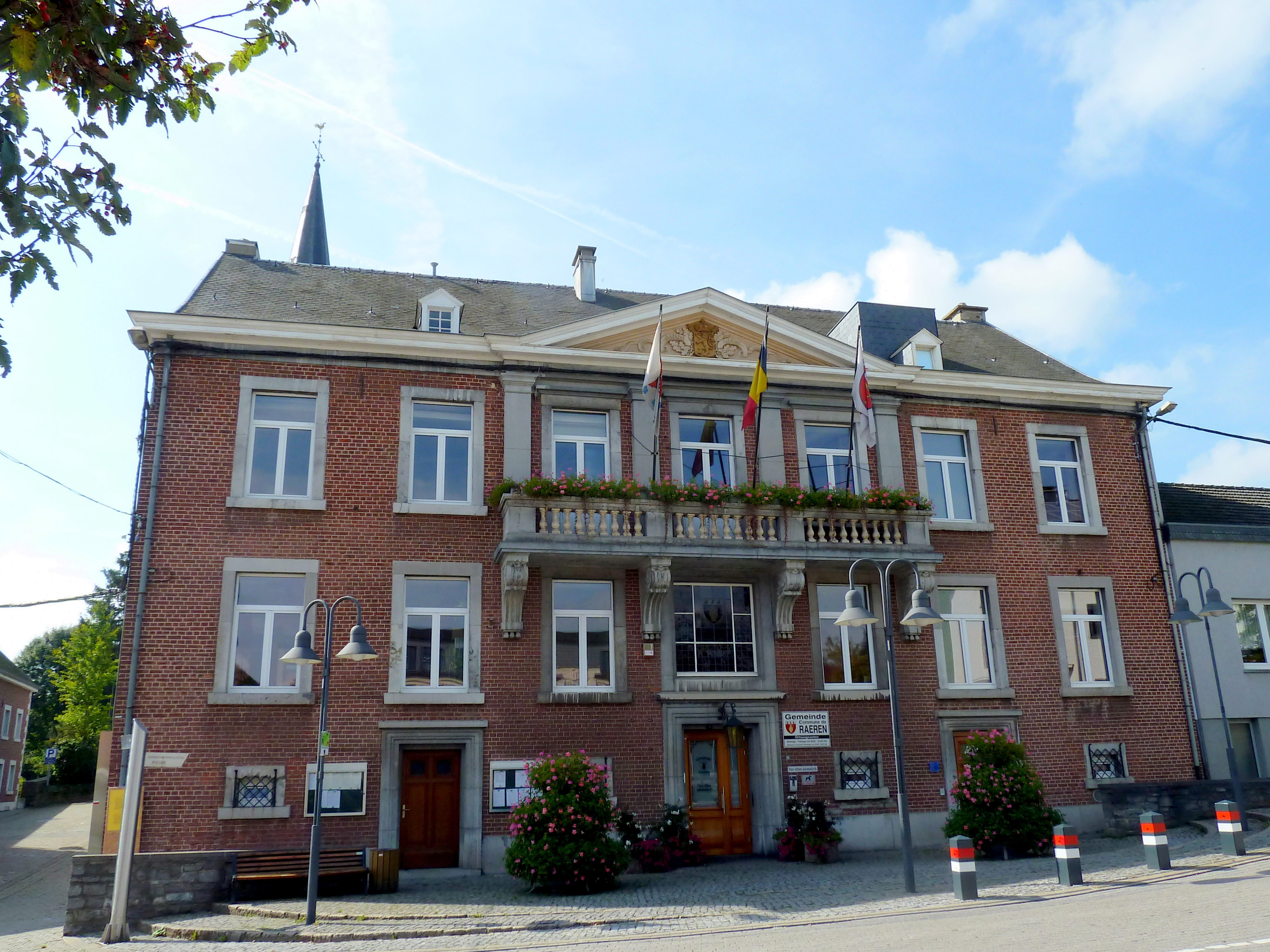 Gemeentehuis Raeren, België